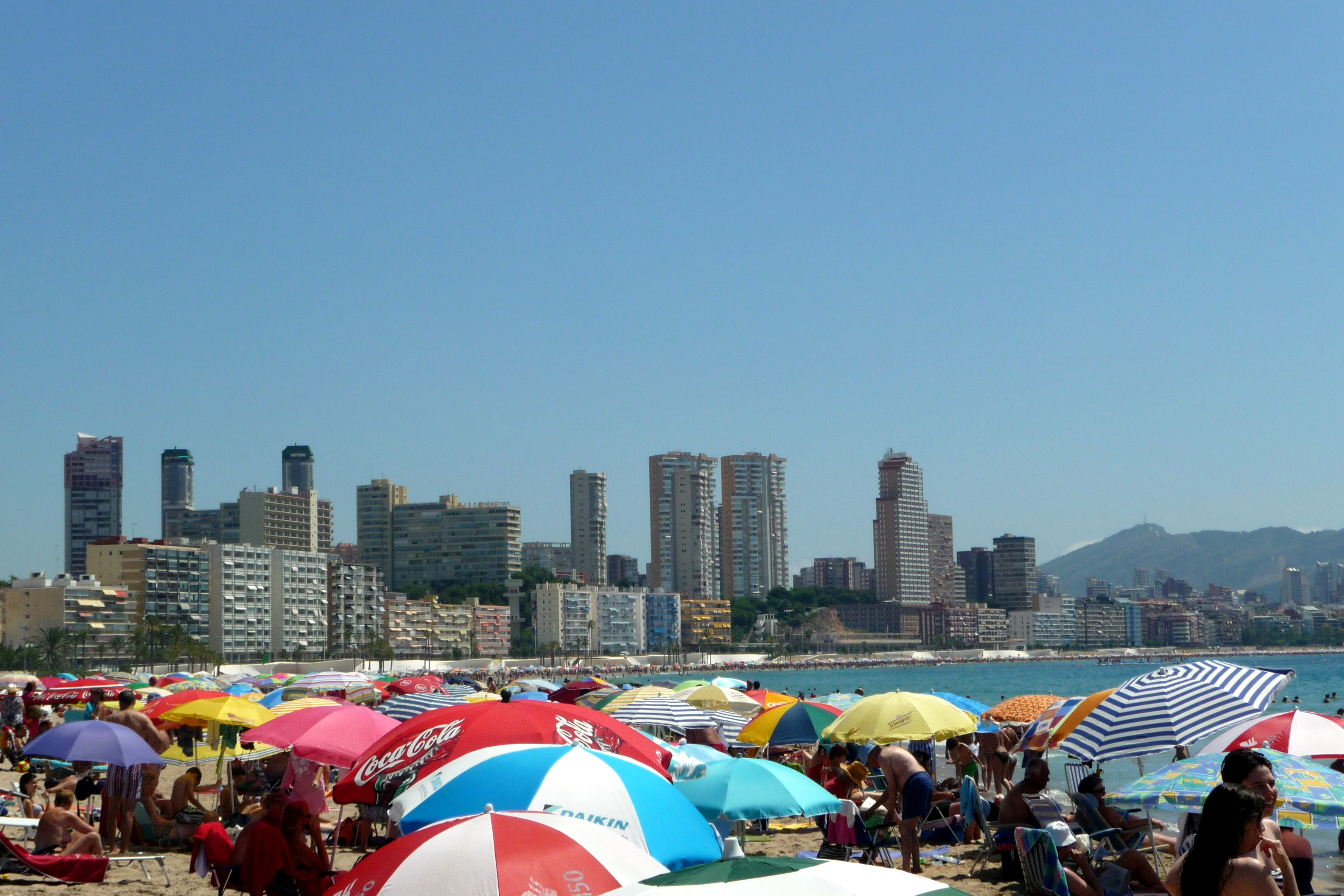 Benidorm